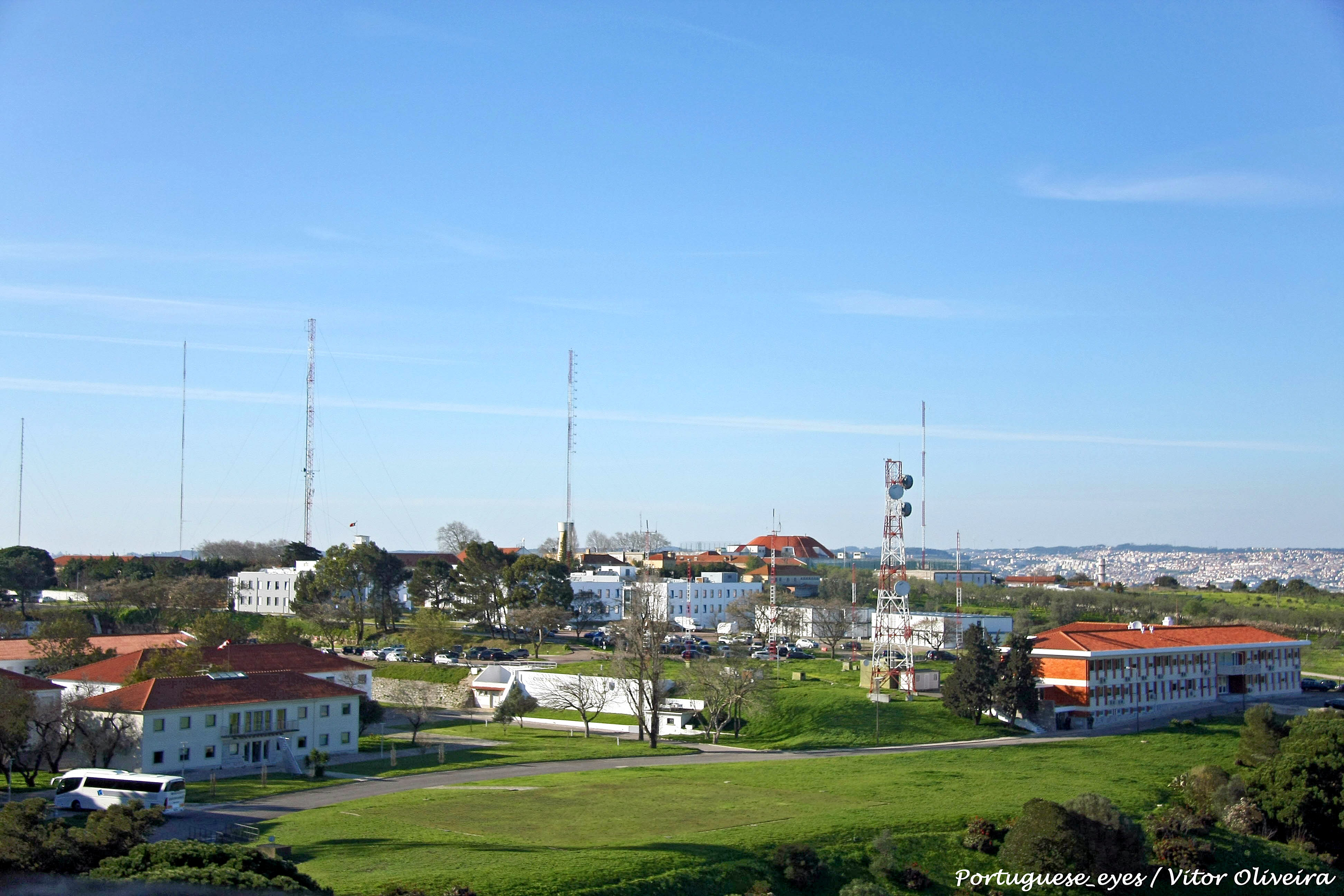 Comando Aéreo da Força Aérea - Lisboa - Portugal 🇵🇹